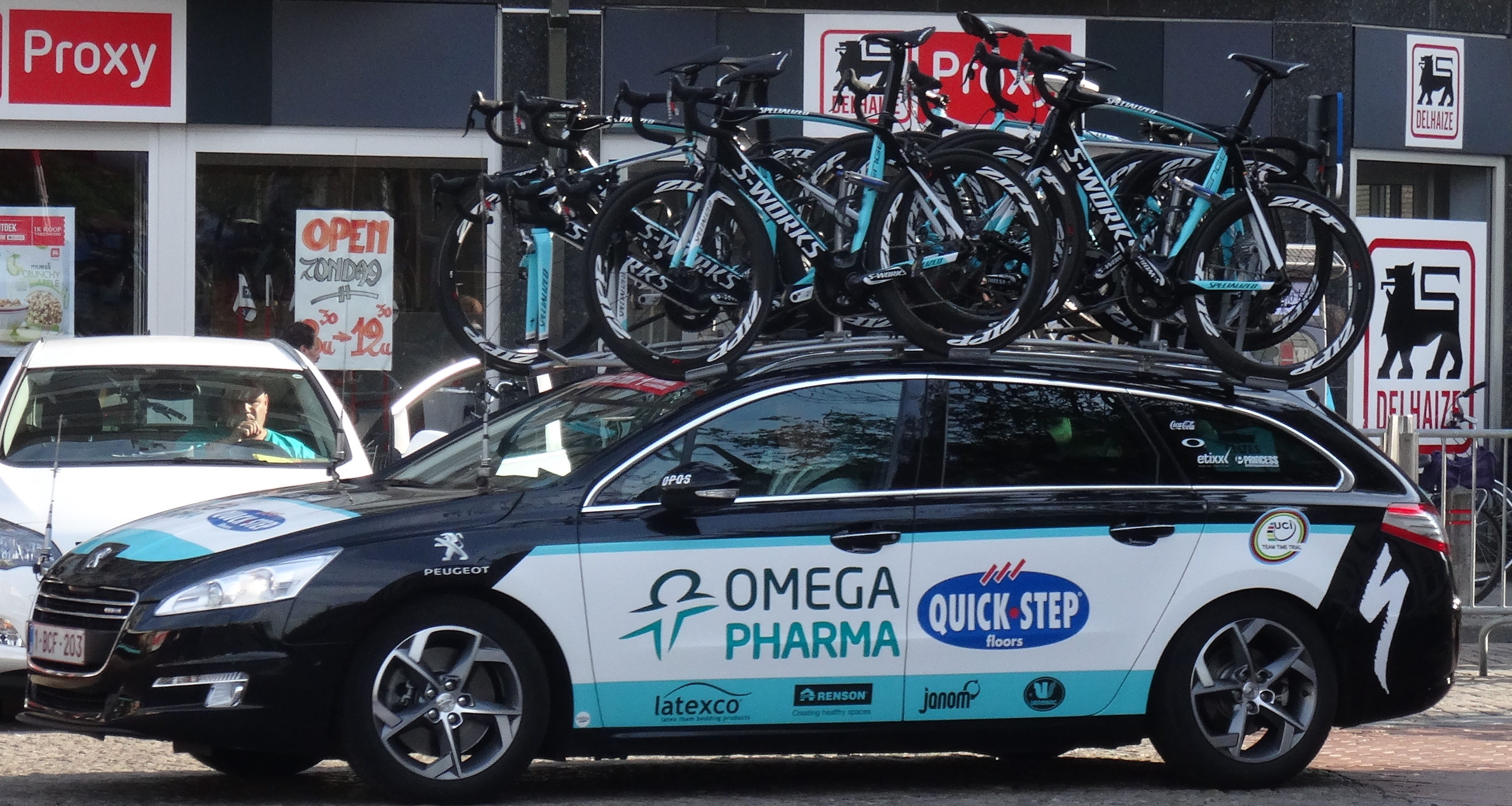 Reportage photographique réalisé le samedi 4 octobre à l'occasion du départ de la troisième étape de l'Eurométropole Tour 2014 à Blankenberge, Belgique.